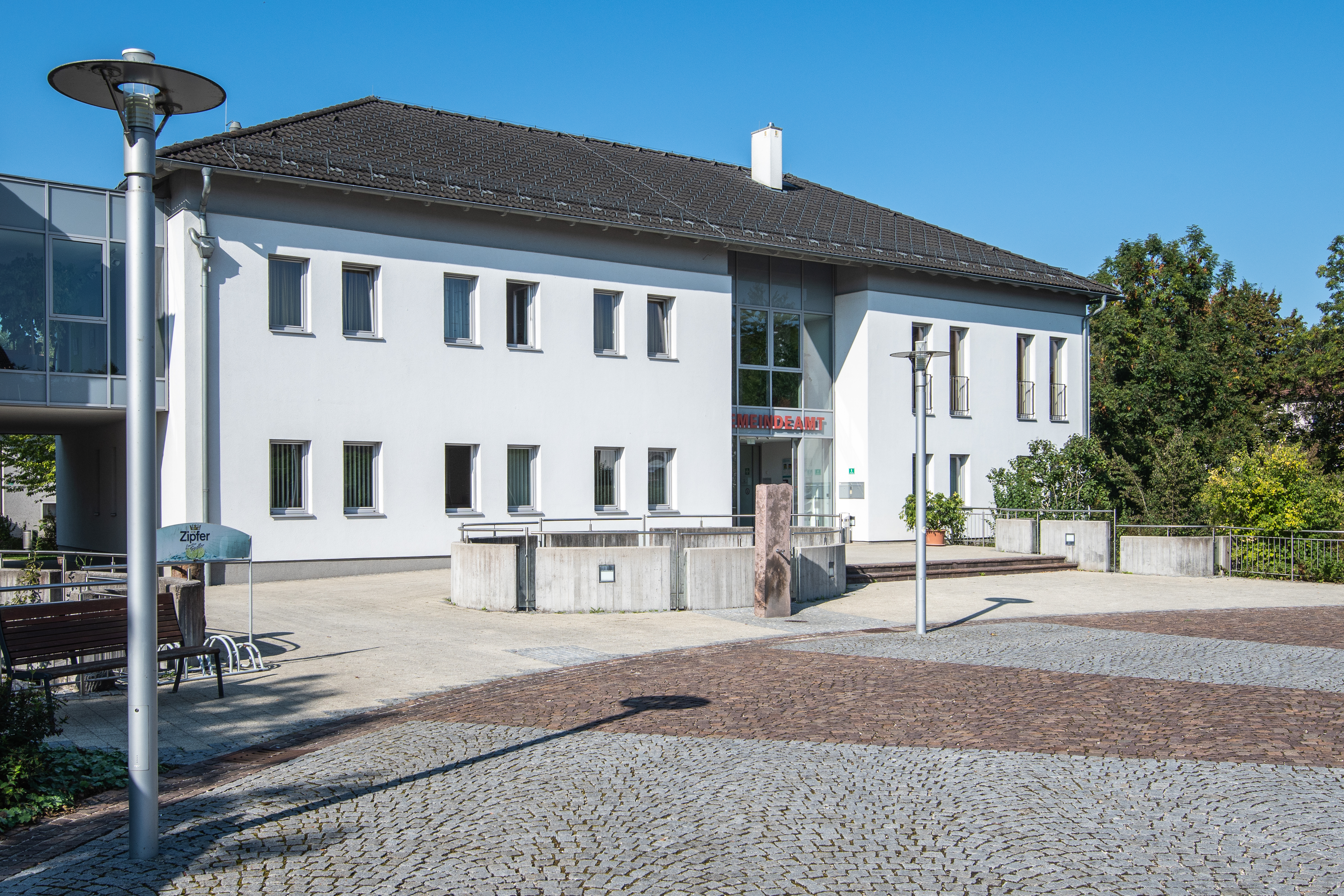 Gemeindeamt Rohr im Kremstal